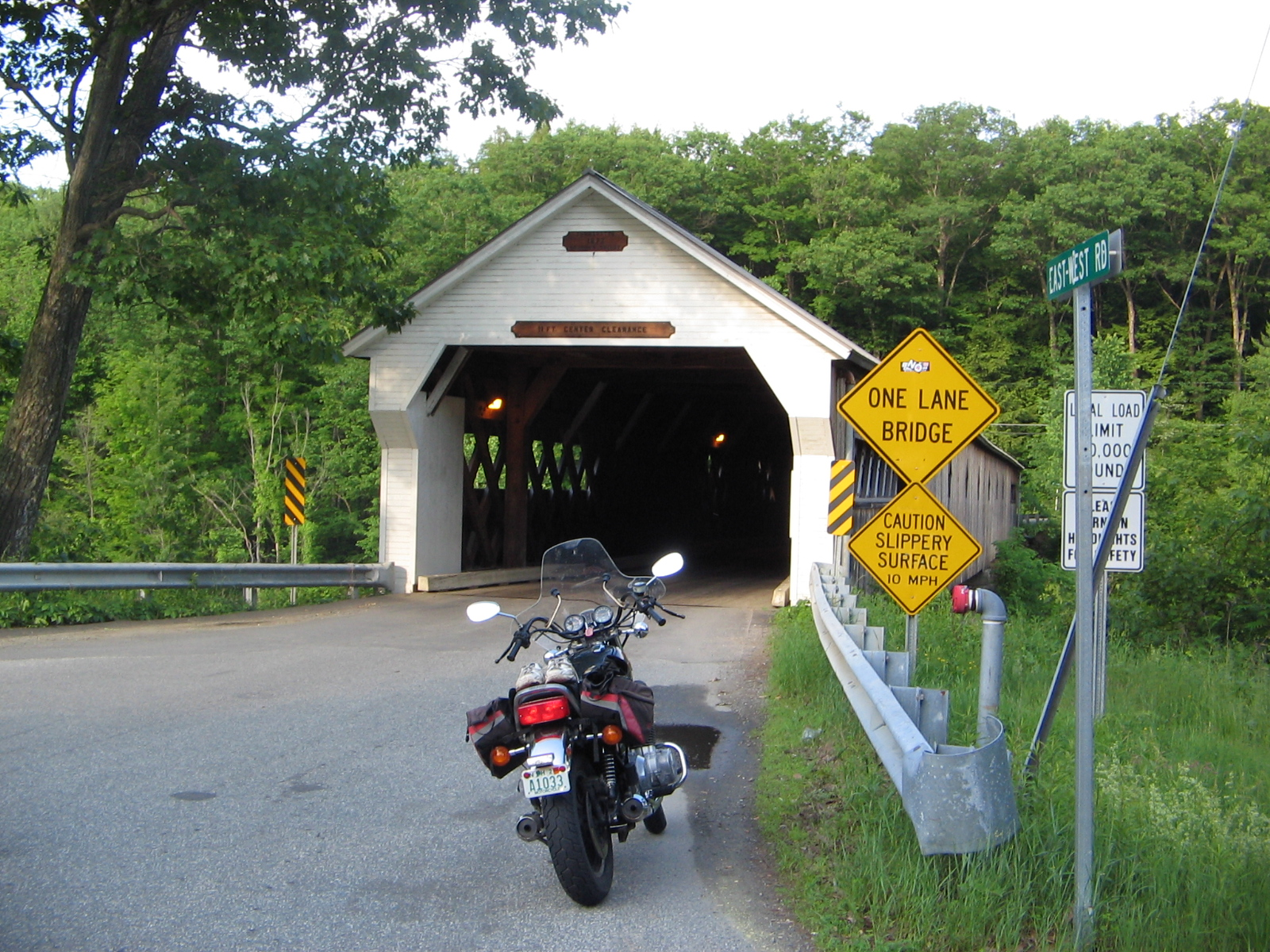 Dummerston Covered Bridge, Dummerston, Vermont